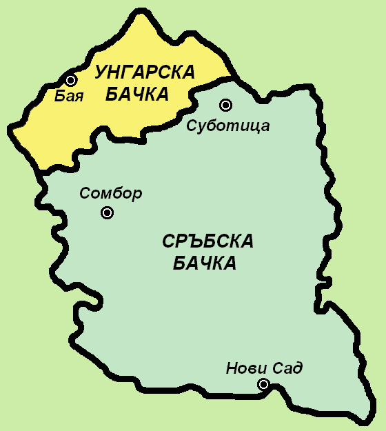 Карта на Унгарска и Сръбска Бачка